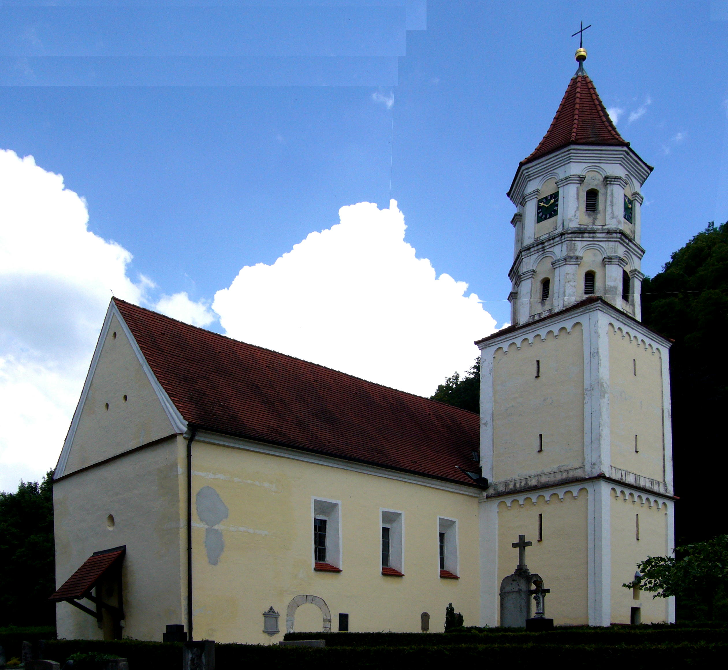 Die katholische Marienkirche in Altenstadt an der Iller